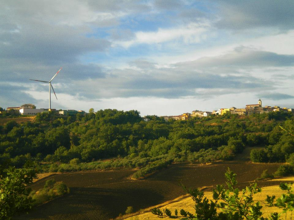 il bellissimo panorama di montelongo